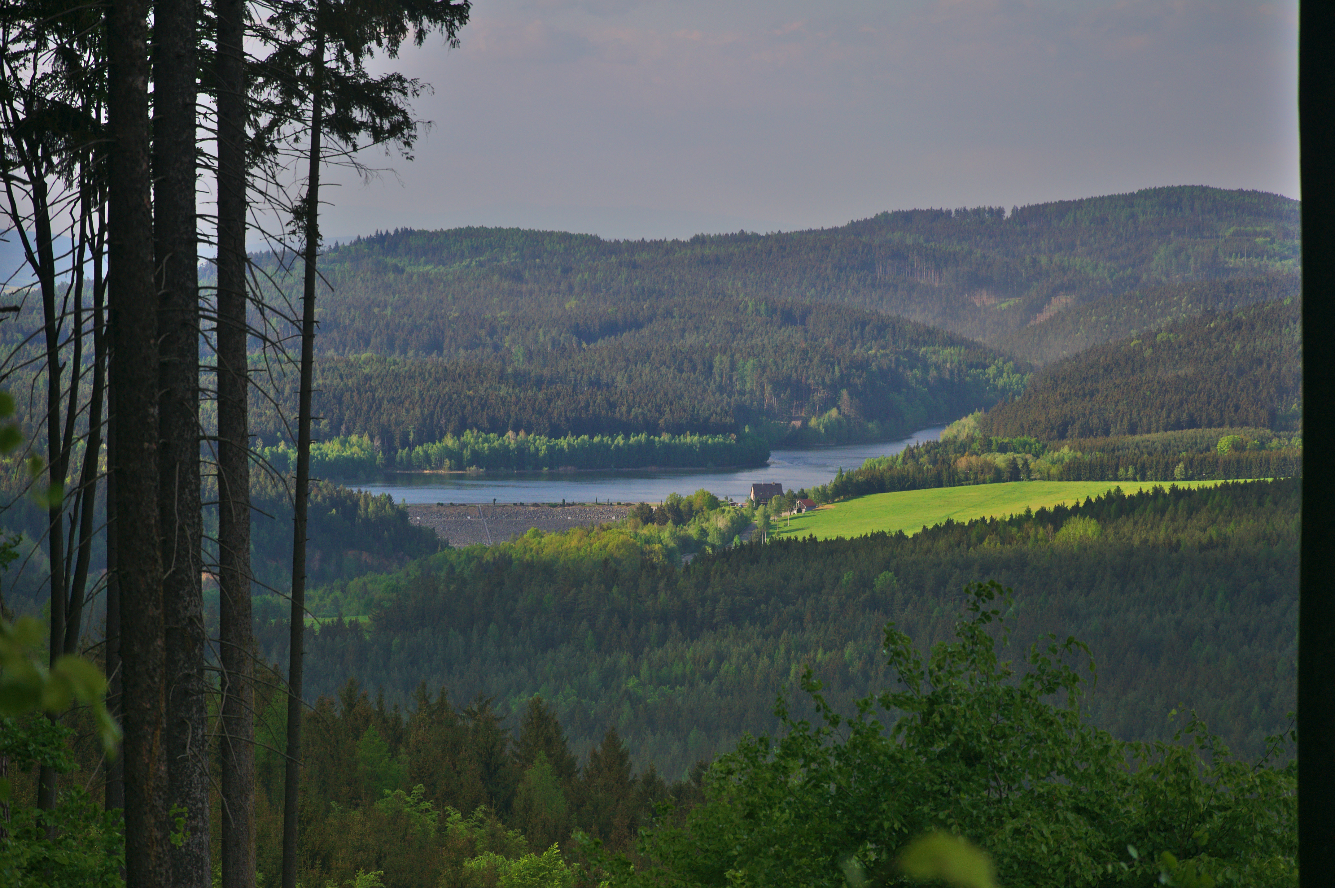 Pohled na Vodní nádrž Boskovice ze skalky jihozápadně od Valchova, okres Blansko